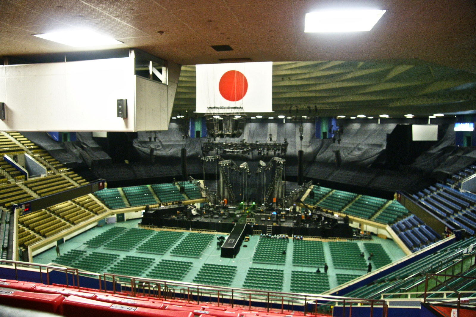 日本武道館の写真です。